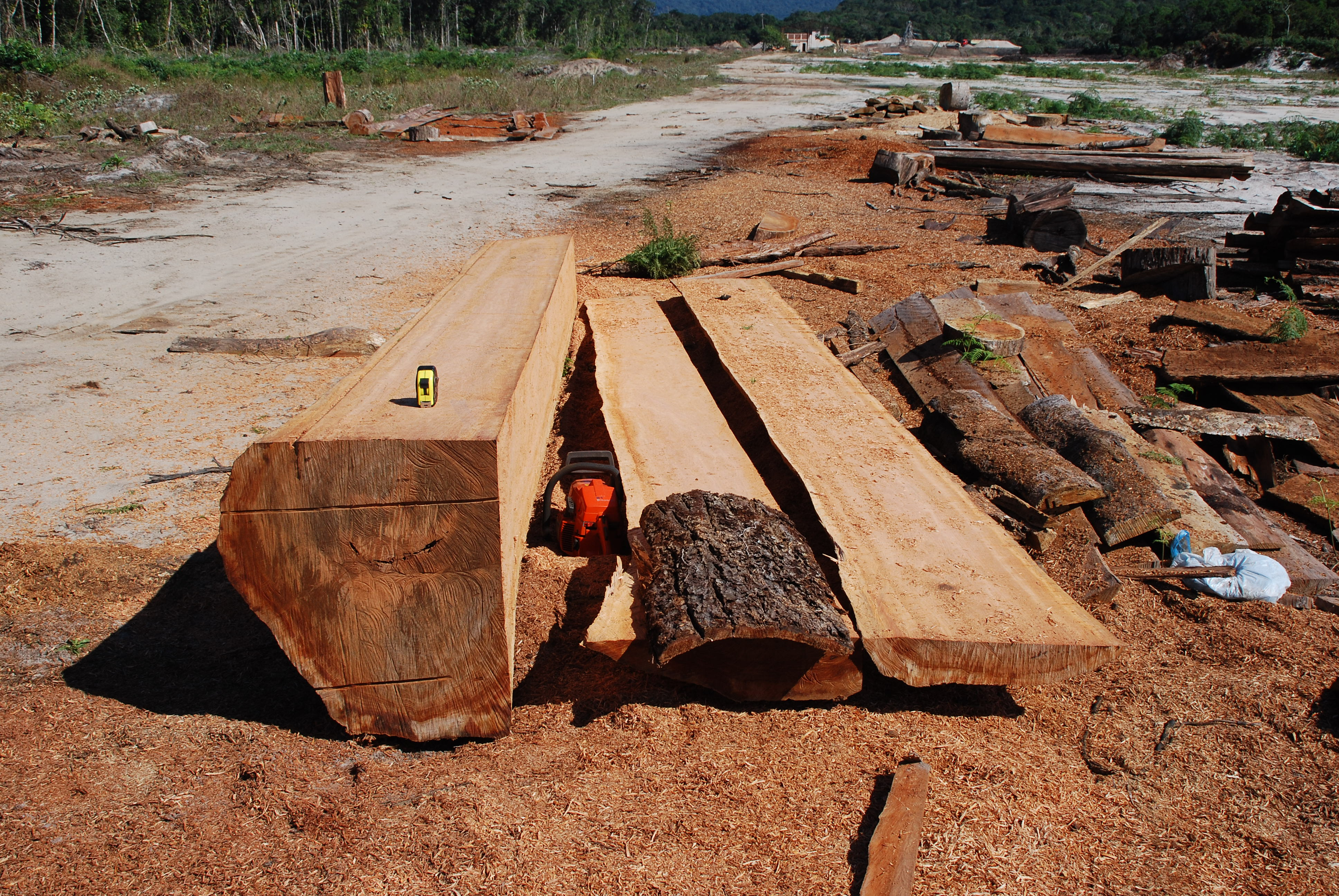 guanandi logs